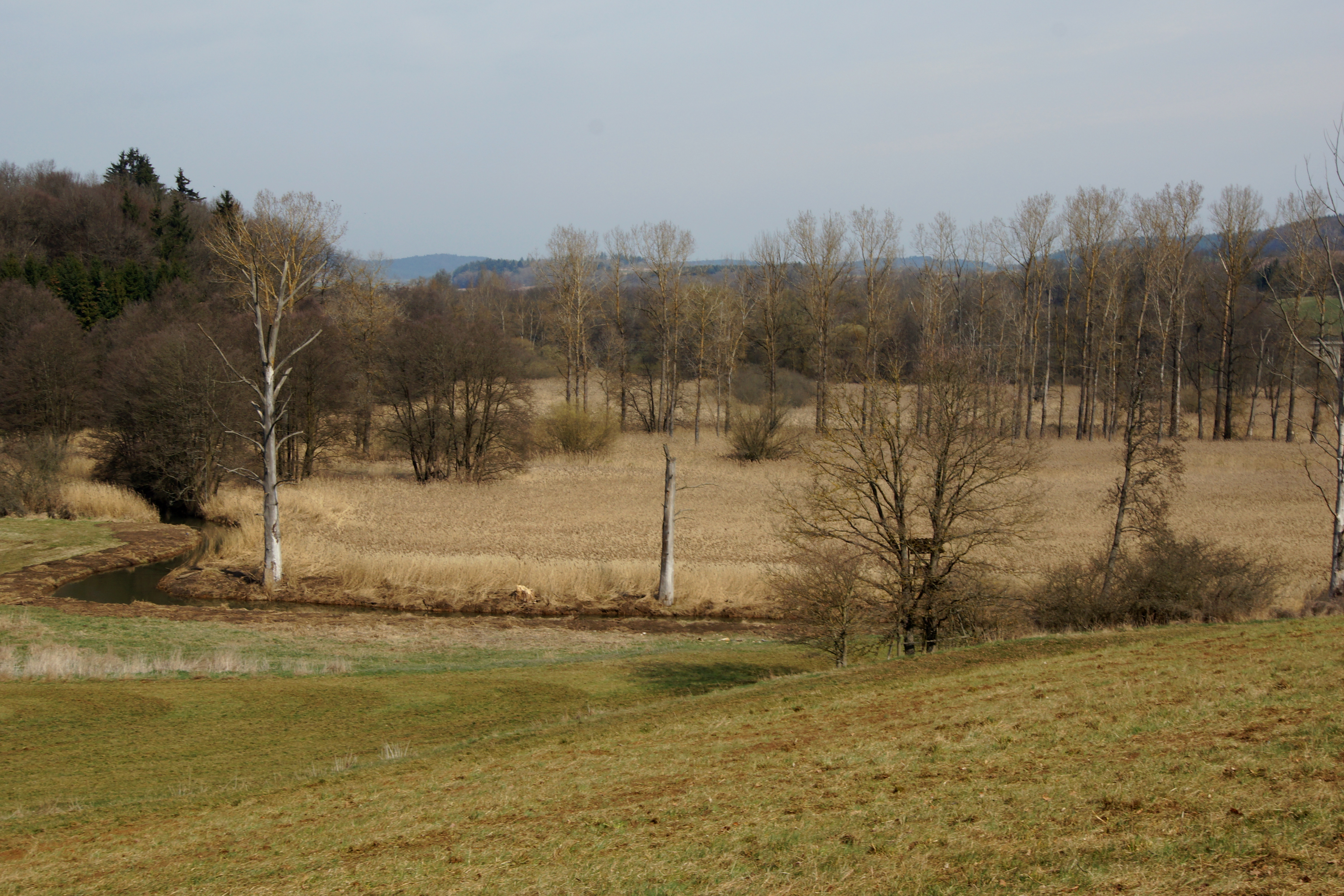 Lengenfeld bei Velburg